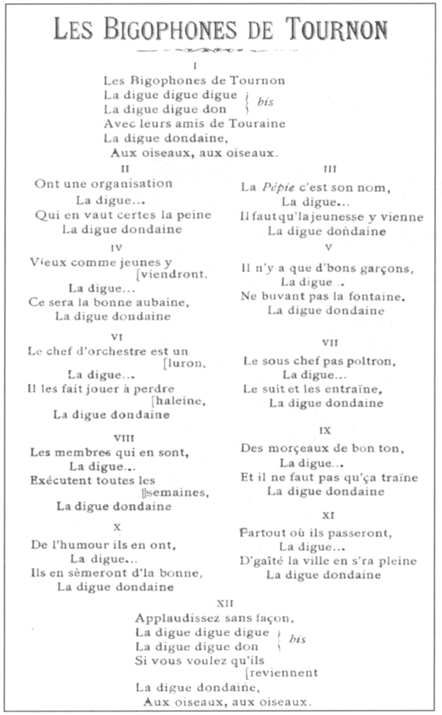 La chanson de la société bigophonique de Tournon-Saint-Martin "La Pépie", à chanter sur l'air de la chanson traditionnelle française "Sur la route de Dijon".